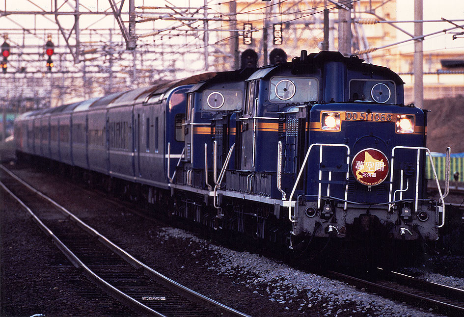 DD51 1068けん引 寝台特急「夢空間北海道」